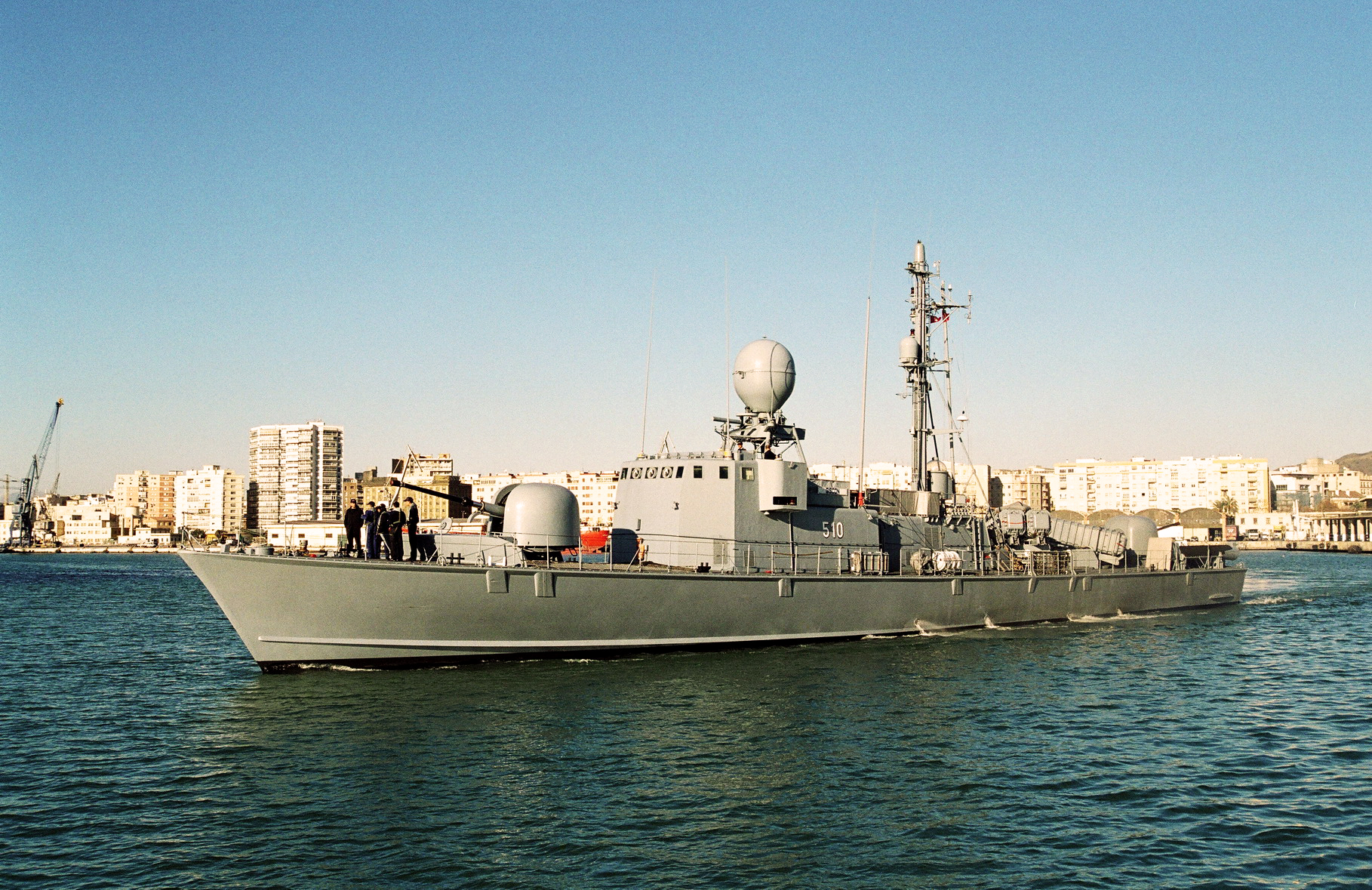 Il pattugliatore Tunisino 510 Gisnon a Malaga